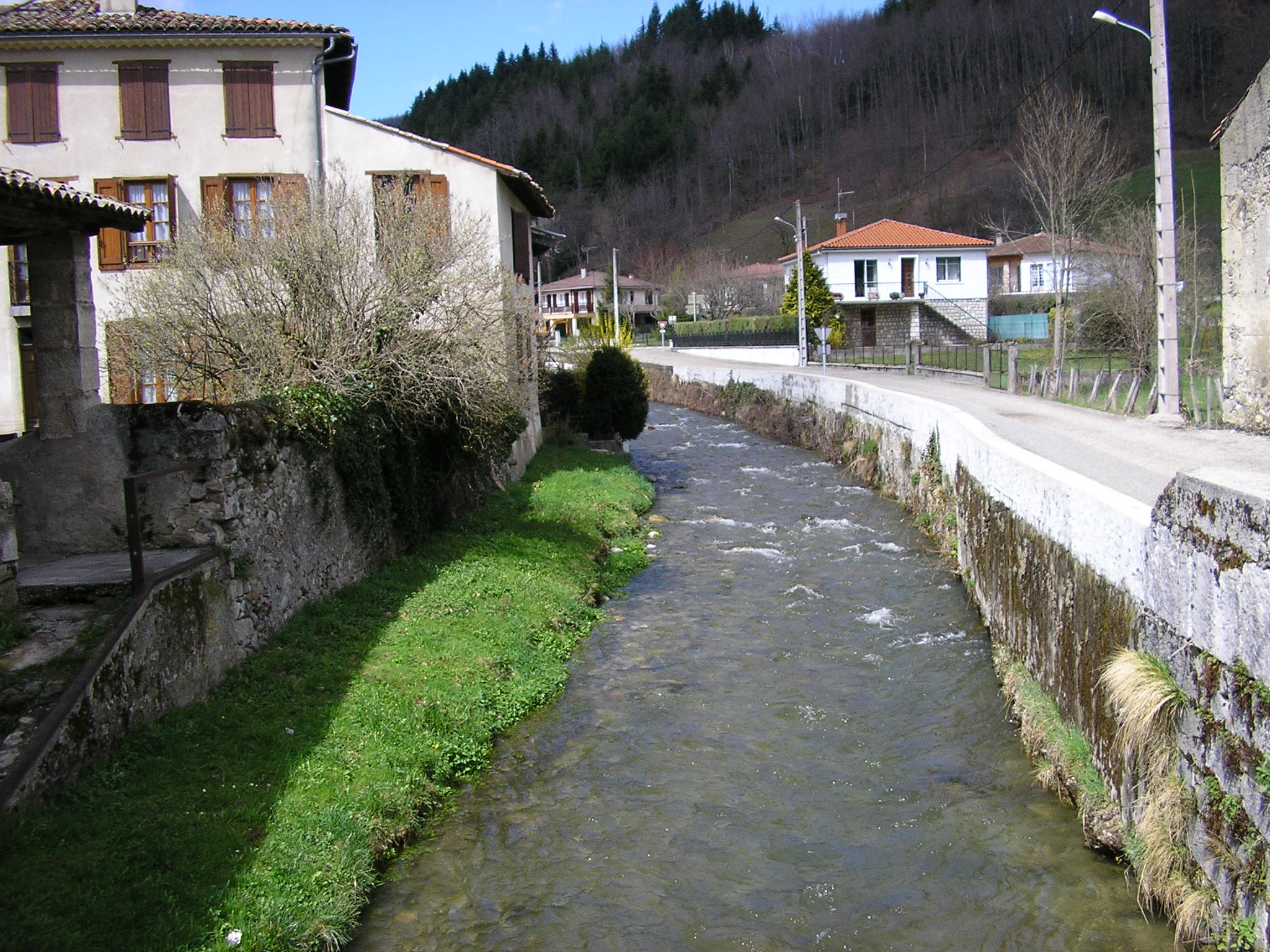 Le Lasset à Fougax-et-Barrineuf (Ariège, France).